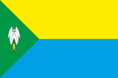 Прапор Городенківського району